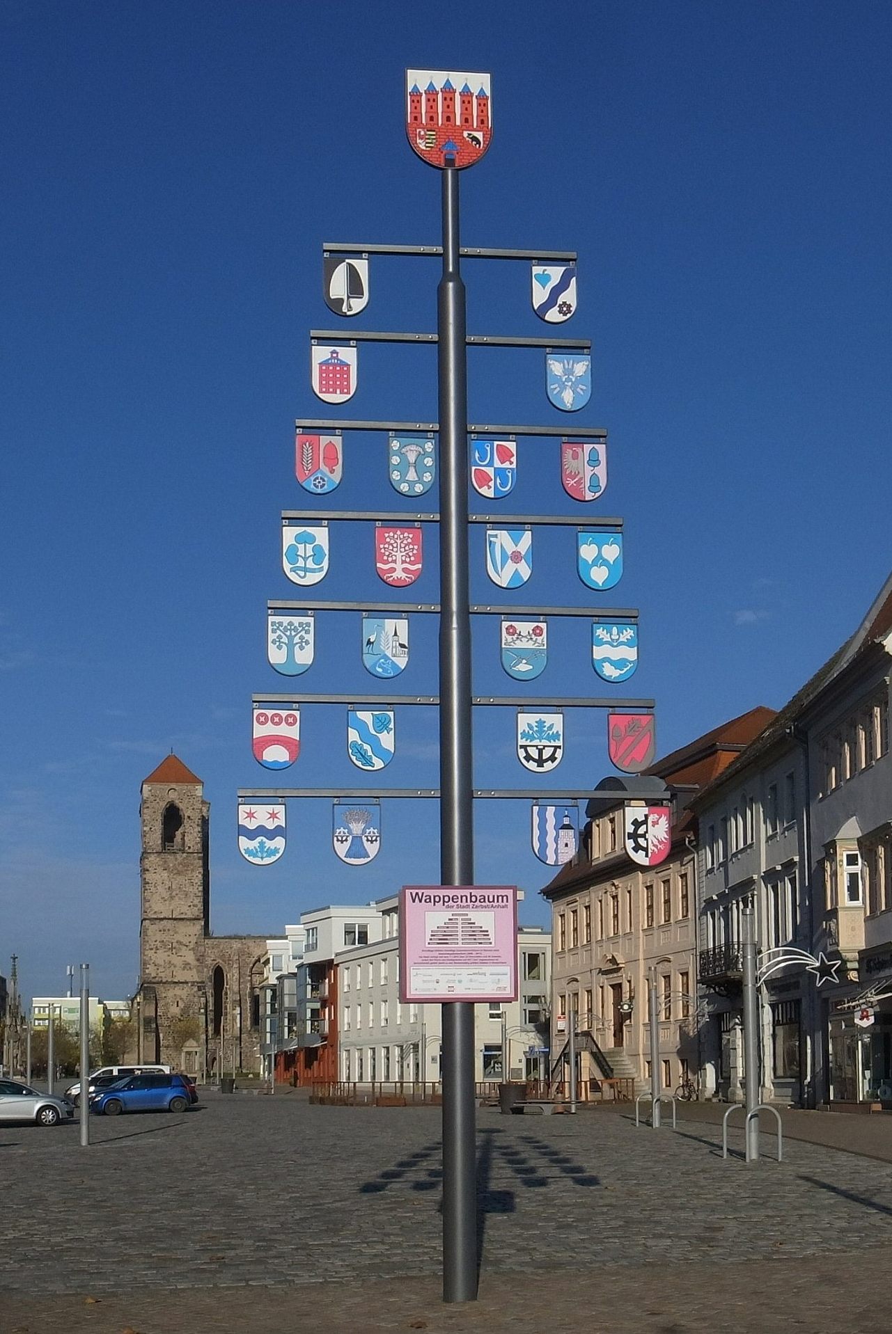 Zerbst/Anhalt, Wappenbaum (Aufgestellt Juni 2012)